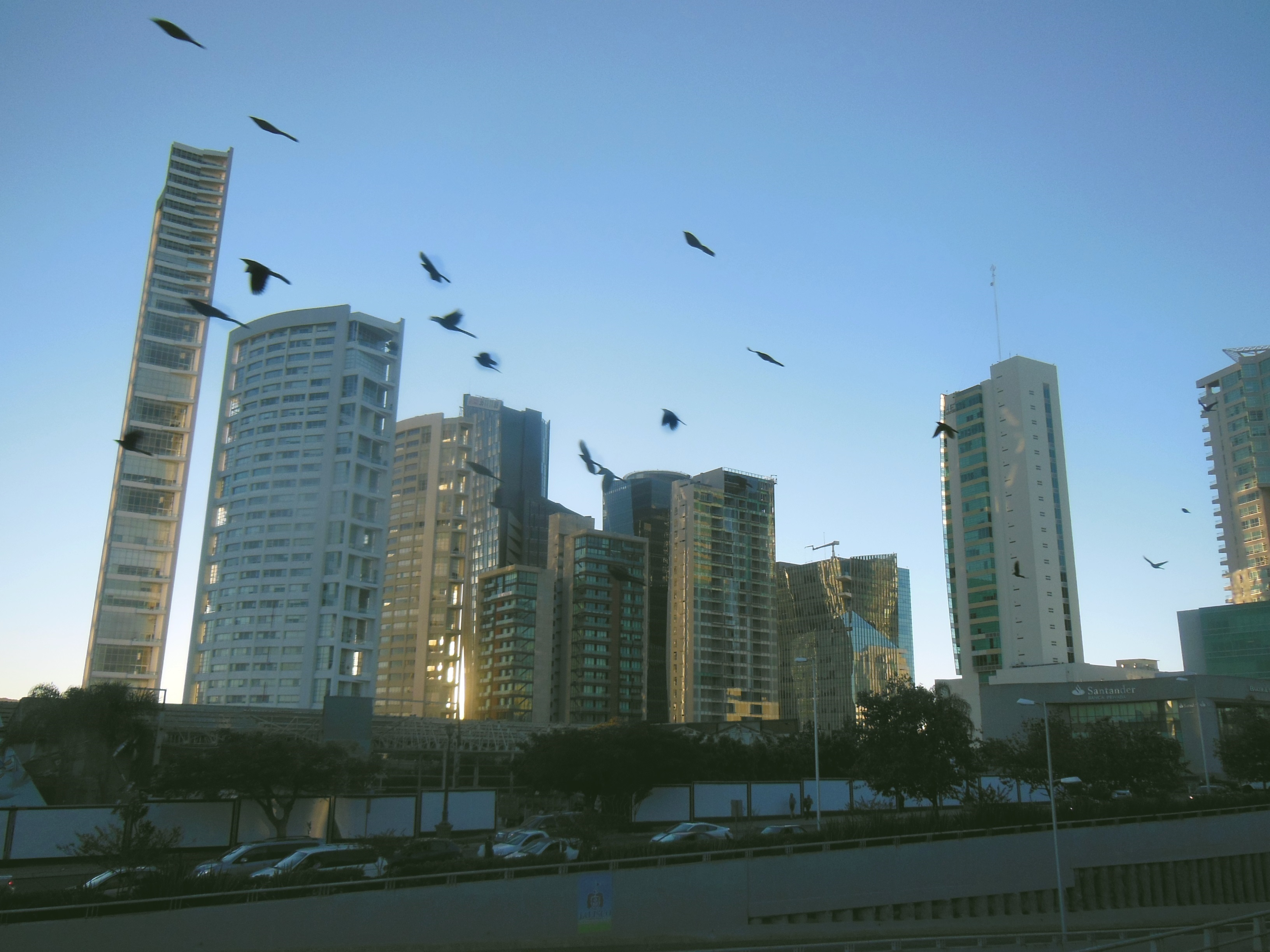 Puerta de Hierro ZM Guadalajara México